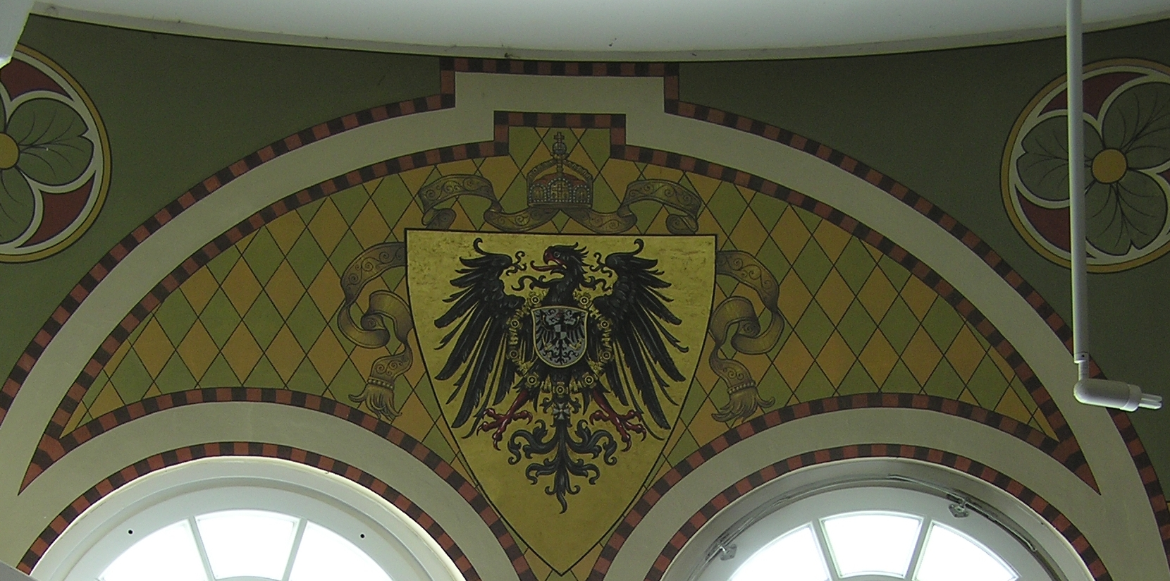 Aumühle,Bismarckturm:Reichsadler über dem Südwestfenster 1.Stock